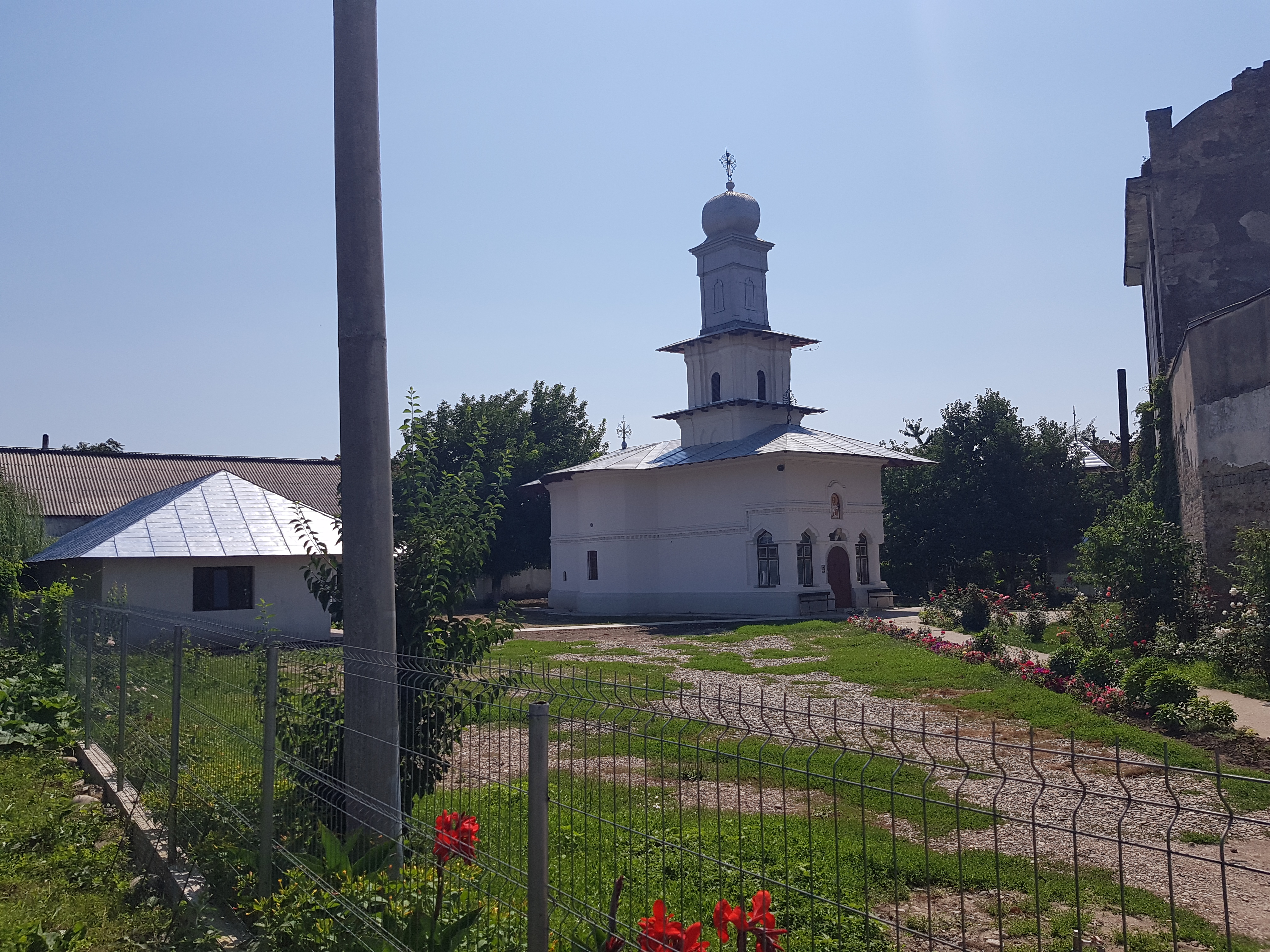 Biserica „Sf. Nicolae”